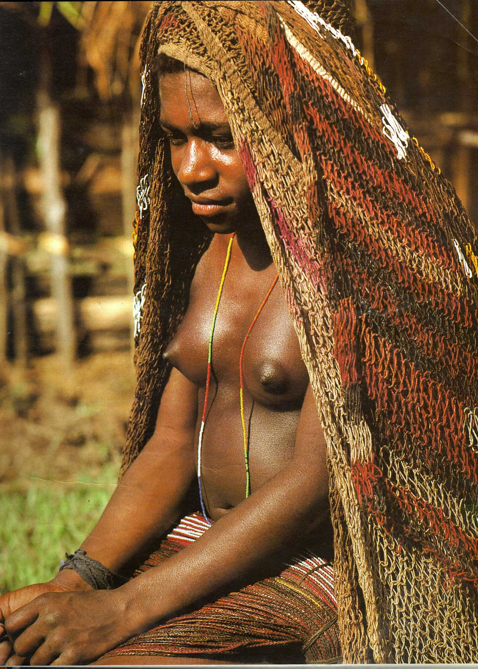 Perkawinan Adat Suku Dani